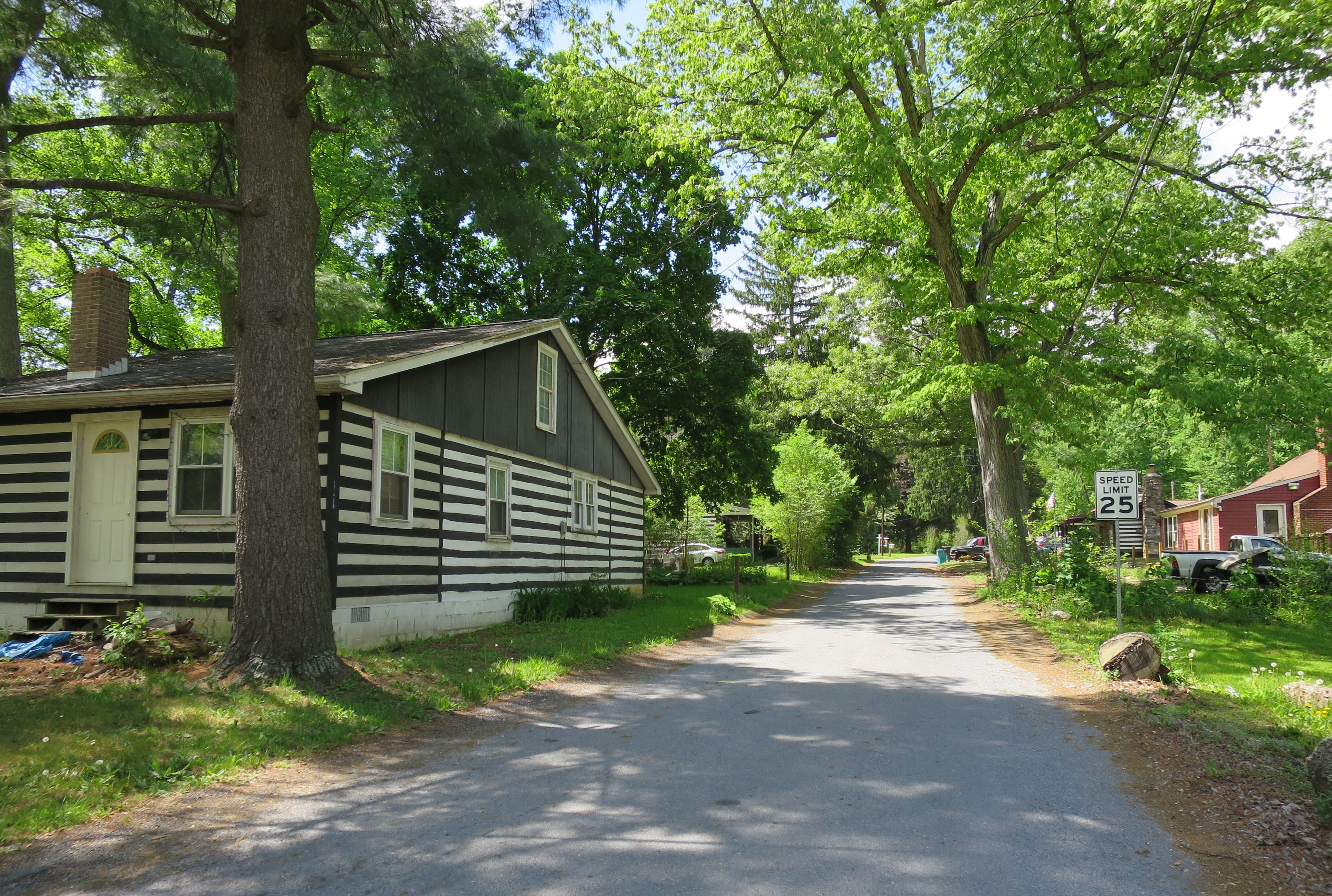 Mountaindale